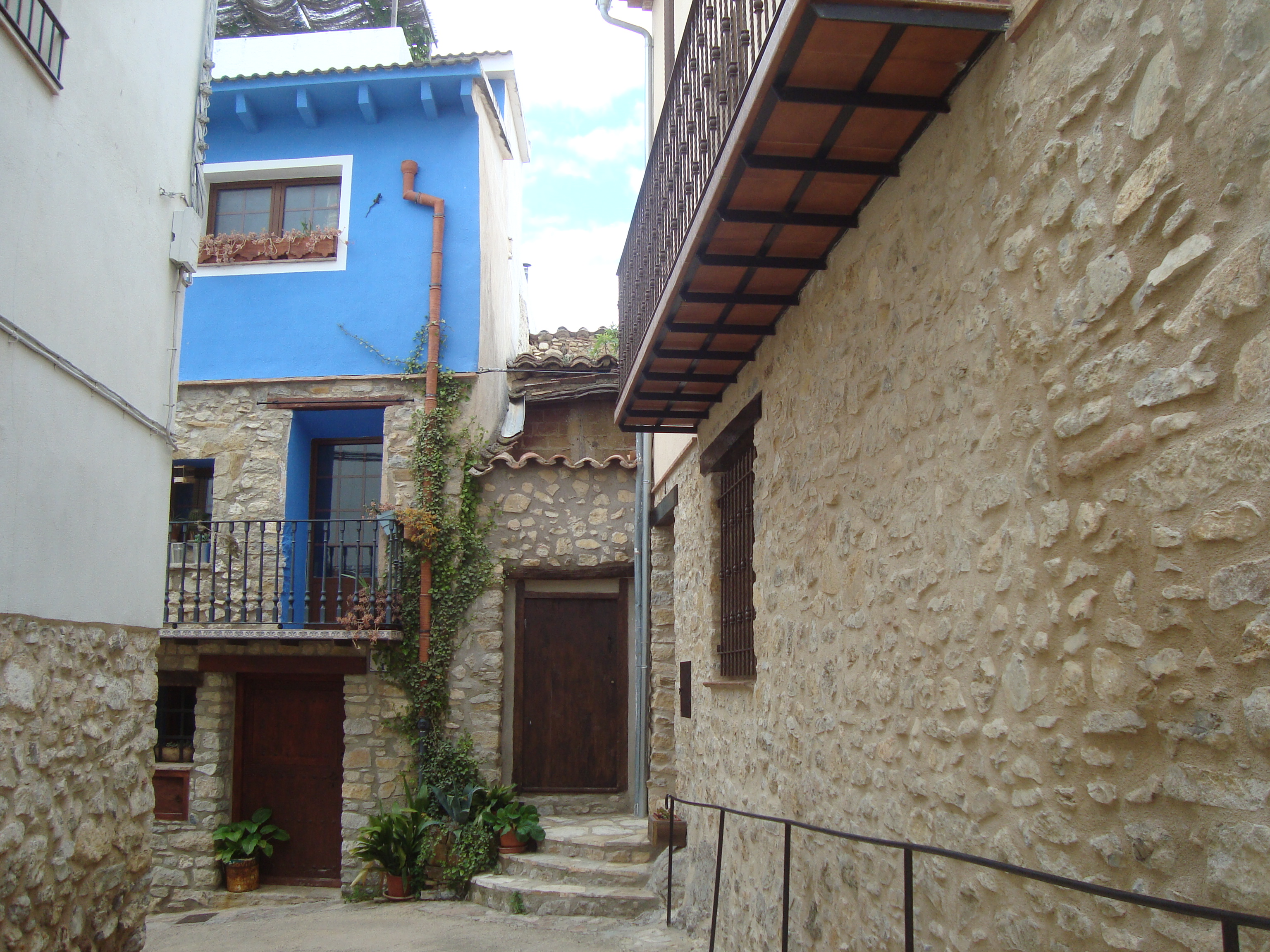 Vista urbana de Villores (Castellón)